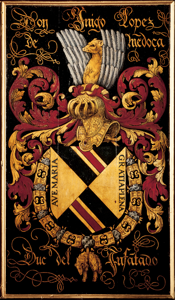 schilder uit Valenciennes; vermoedelijk Jacques Le Boucq, Blazoen van het 23ste Gulden-Vlieskapittel, 1559, Don Inigo Lopez MendoÃ§a; inv: 433 N.193